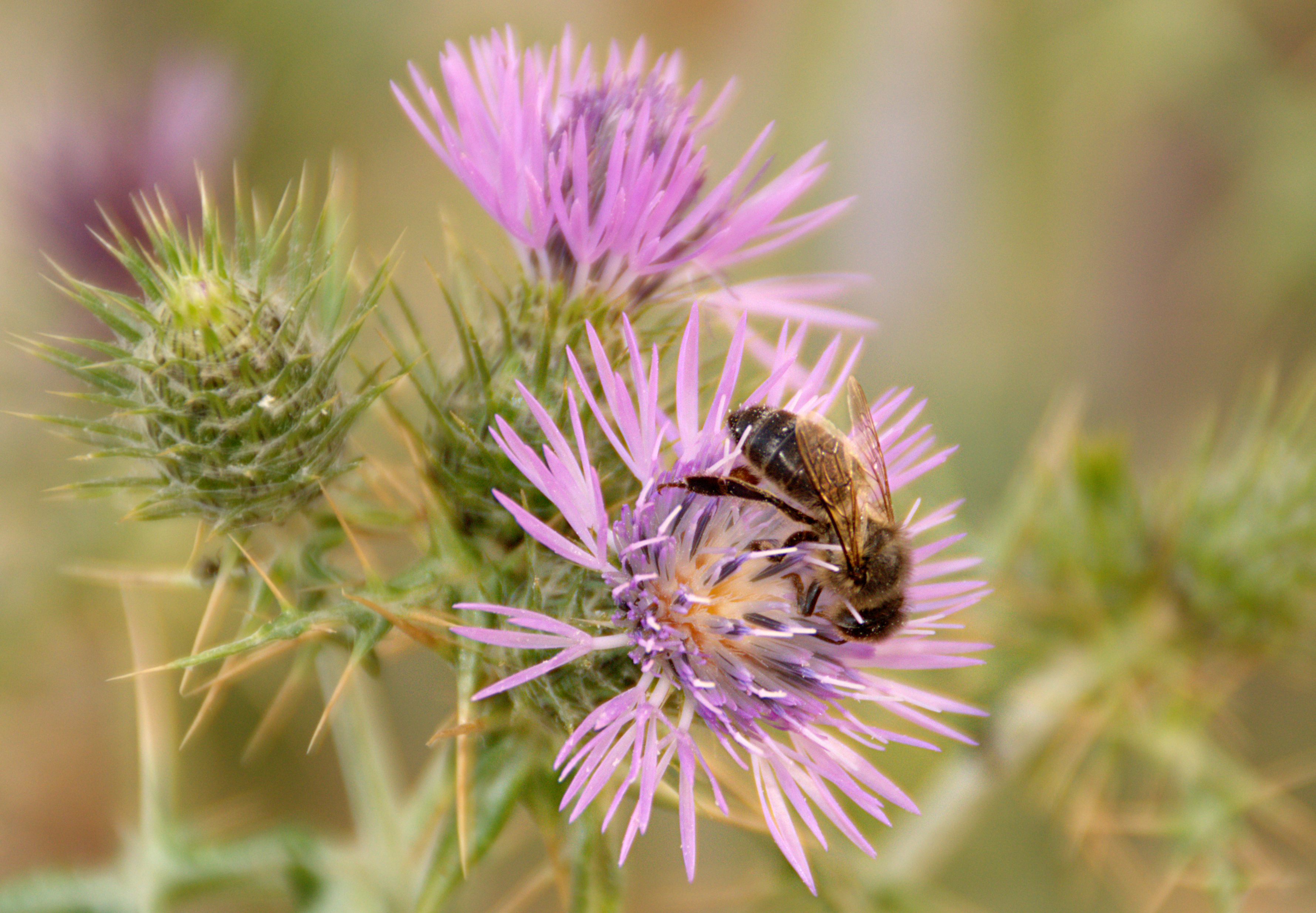 Abeille Tellienne (Tunisie)